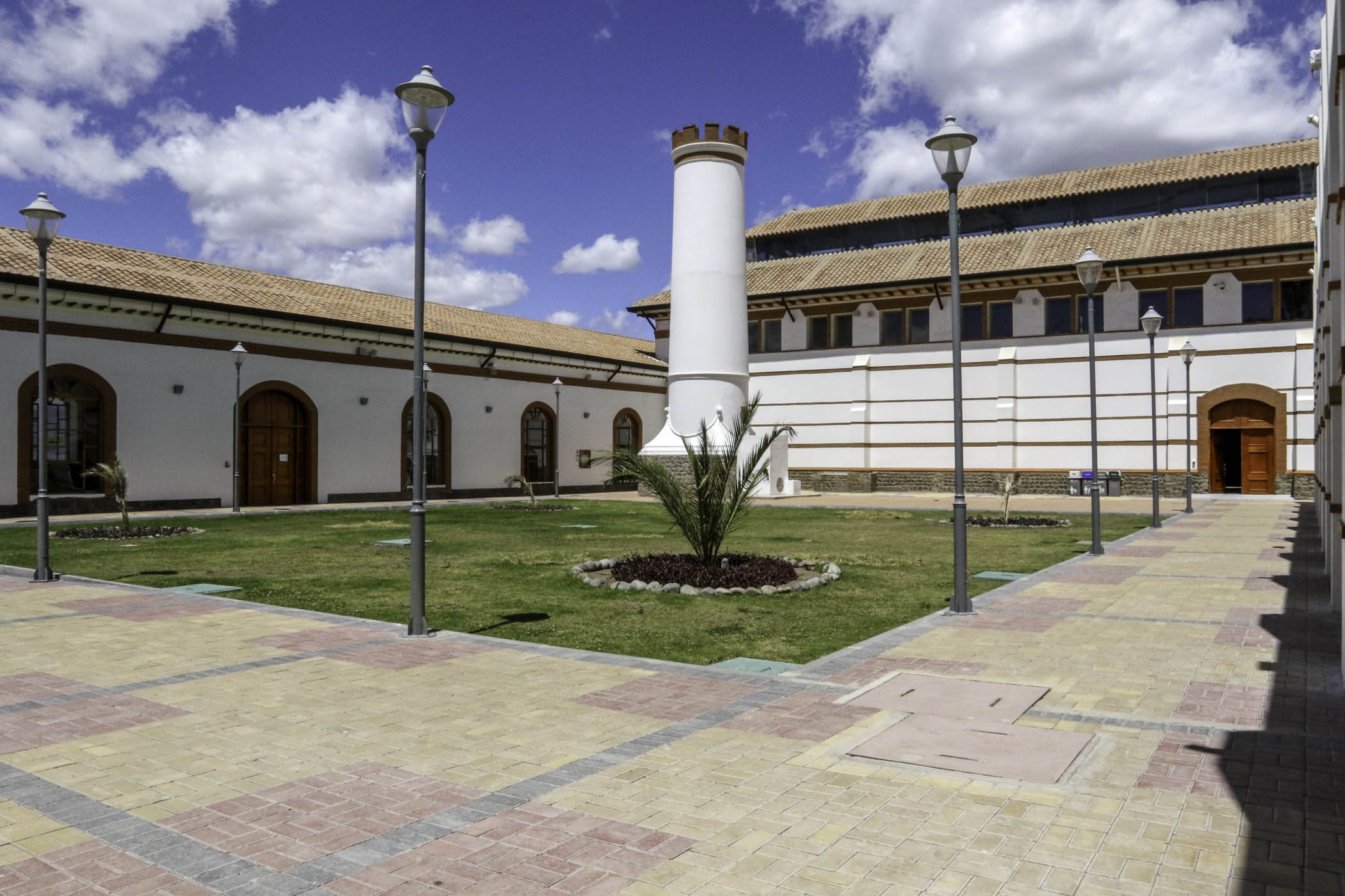 YACHAY CIUDAD 5 MAV